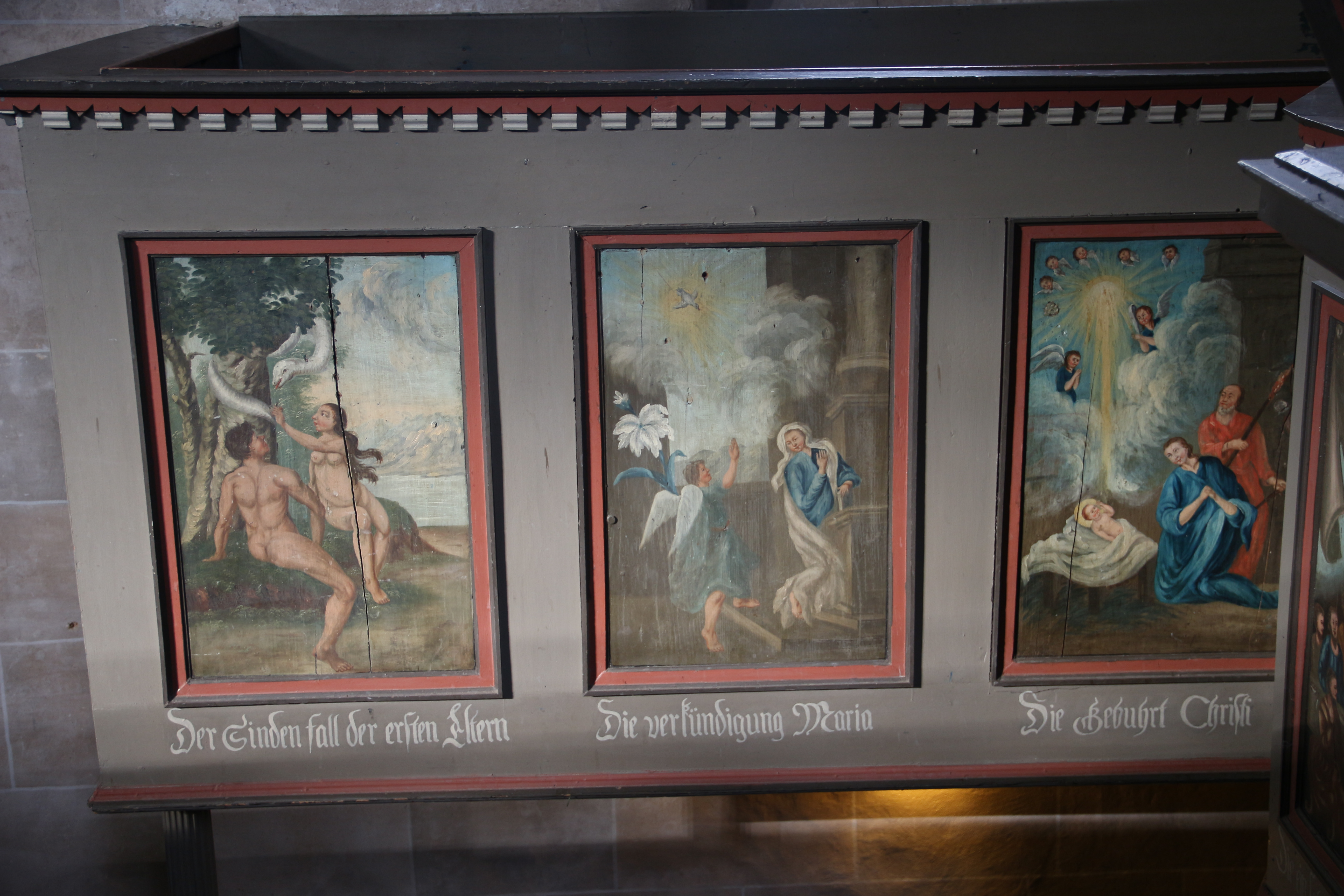 Lohra - Evangelische Kirche